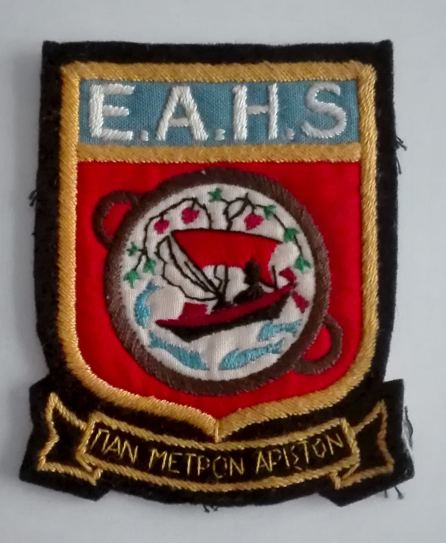 St. Constantine's EAHS logo